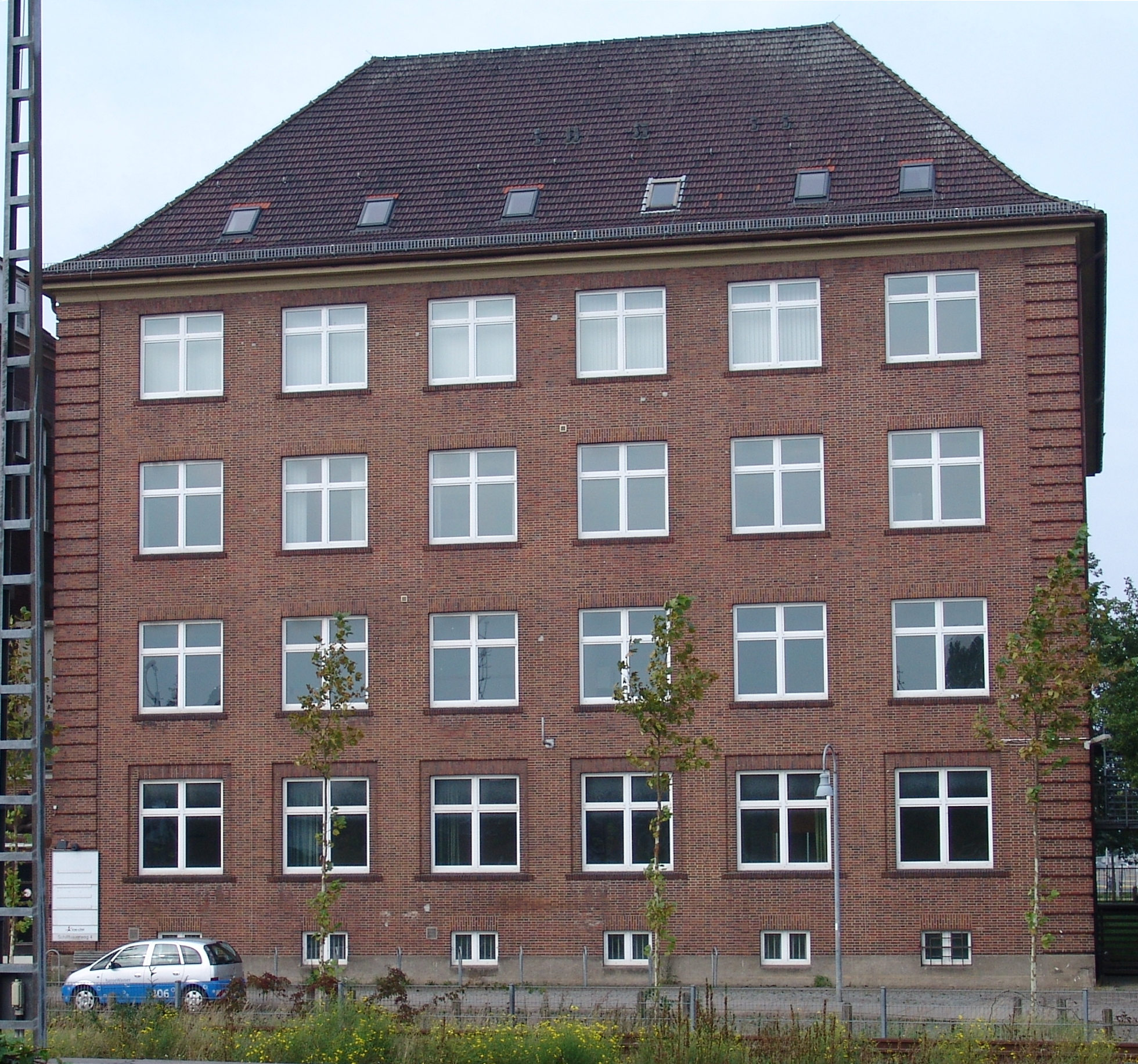 A.G. "Weser", Erweiterungsbau des Verwaltungsgebäudes in Bremen, Schiffbauerweg 4 / Ludwig-Plate-Straße.Das abgebildete Objekt ist ein geschütztes Kulturdenkmal in der Freien Hansestadt Bremen, mit der Nr. 1747 beim Landesamt für Denkmalpflege registriert.